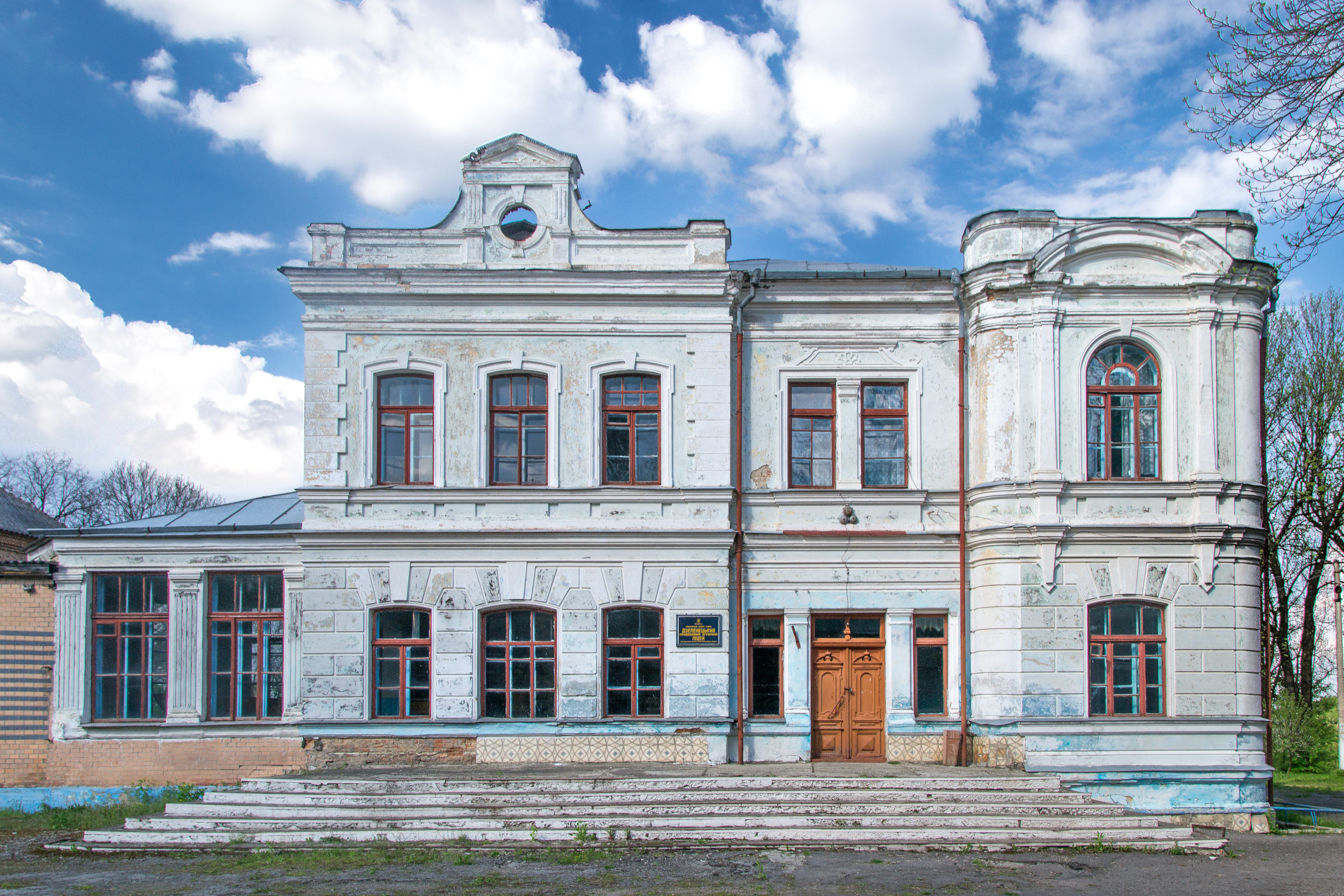 Палац Залевських (мур.), село Дзеленці